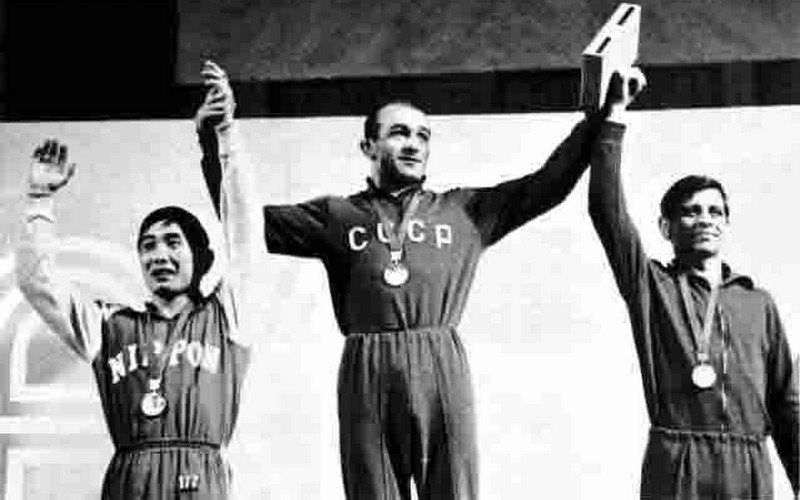 Hideo Fujimoto, Roman Rurua, Simion Popescu, 1968 Olympics